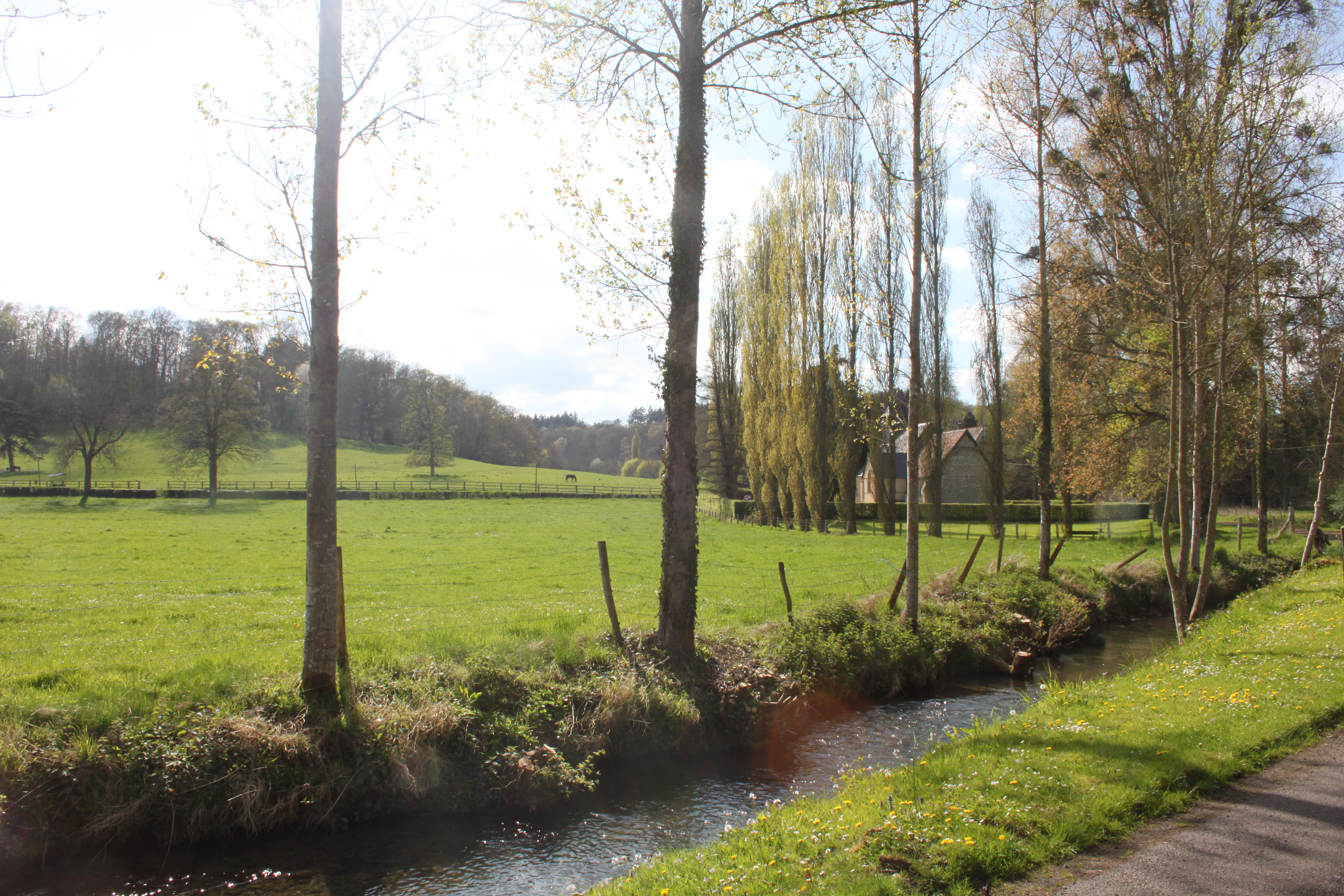 Village de Livet-sur-Authou. Vue du vallon avec, au premier temps, le torrent d'Authou, et, au second plan, l'église.